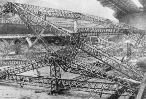 L 37 demonteres i Seddin for udlevering til Japan